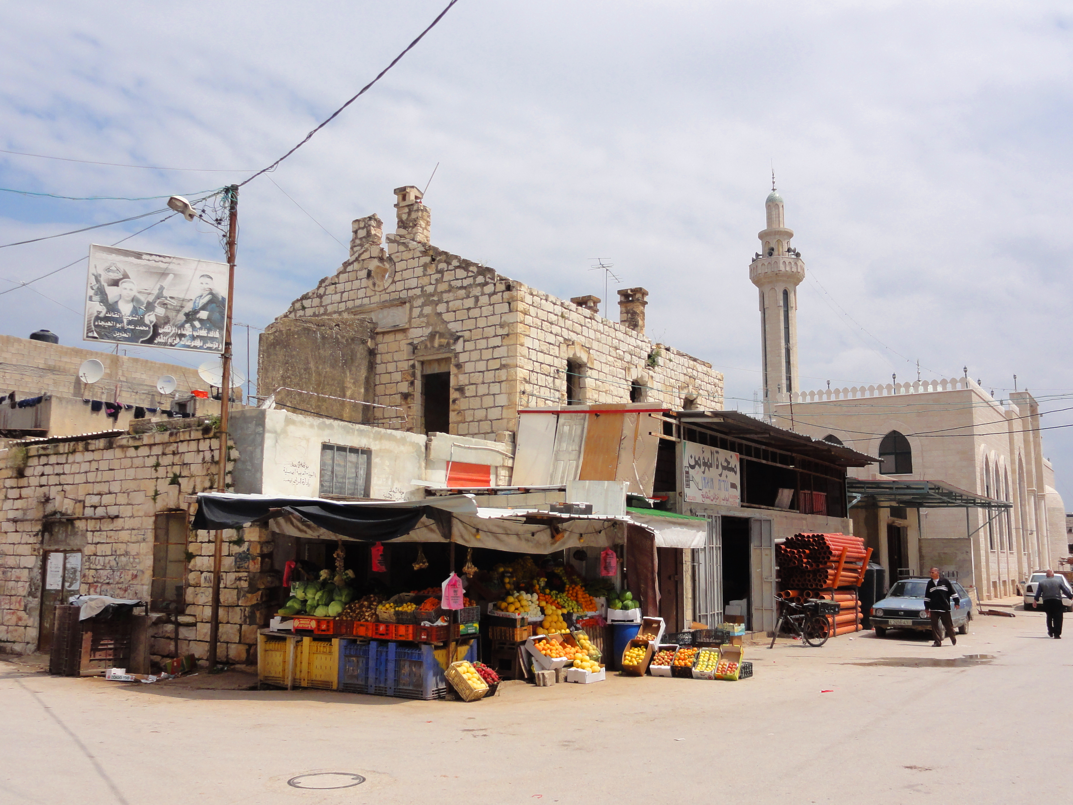 Jenin RC